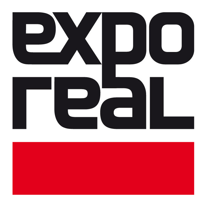 EXPO REAL, Internationale Fachmesse für Gewerbeimmobilien